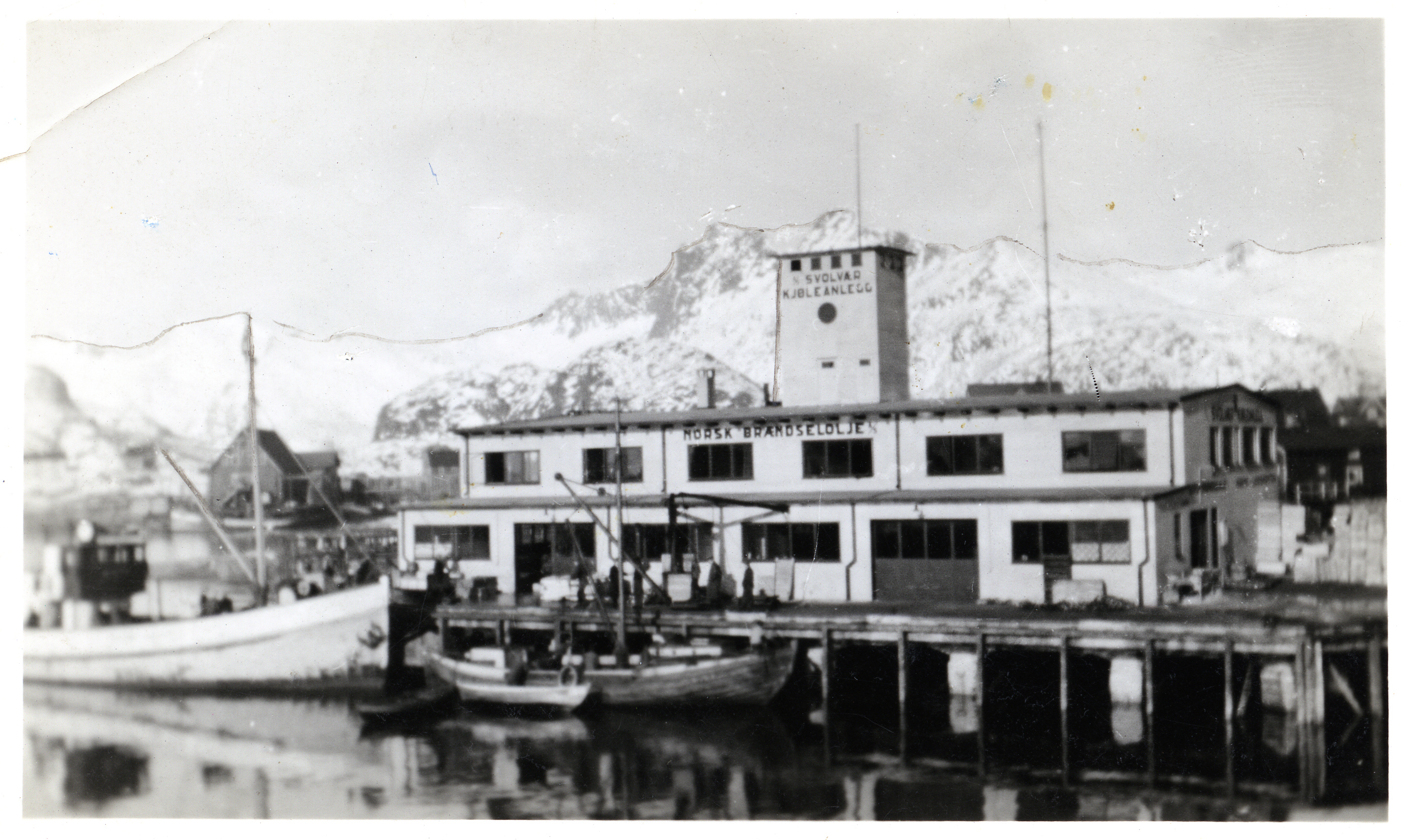 Bildet er hentet fra Arkivverket. Norsk Brændseloljes kontor i Svolvær Arkivinstitusjon : Statsarkivet i Stavanger Arkivnavn : Pa 1761 - Statoil Fuel and Retail Norge AS Sted : Norge, Nordland, Vågan, Emneord: Olje, Petroleum Avbildet